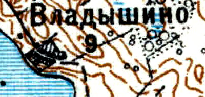 Топографическая карта Ленинградской области, квадрат Vc-29 (Батецкая), деревня Владычно